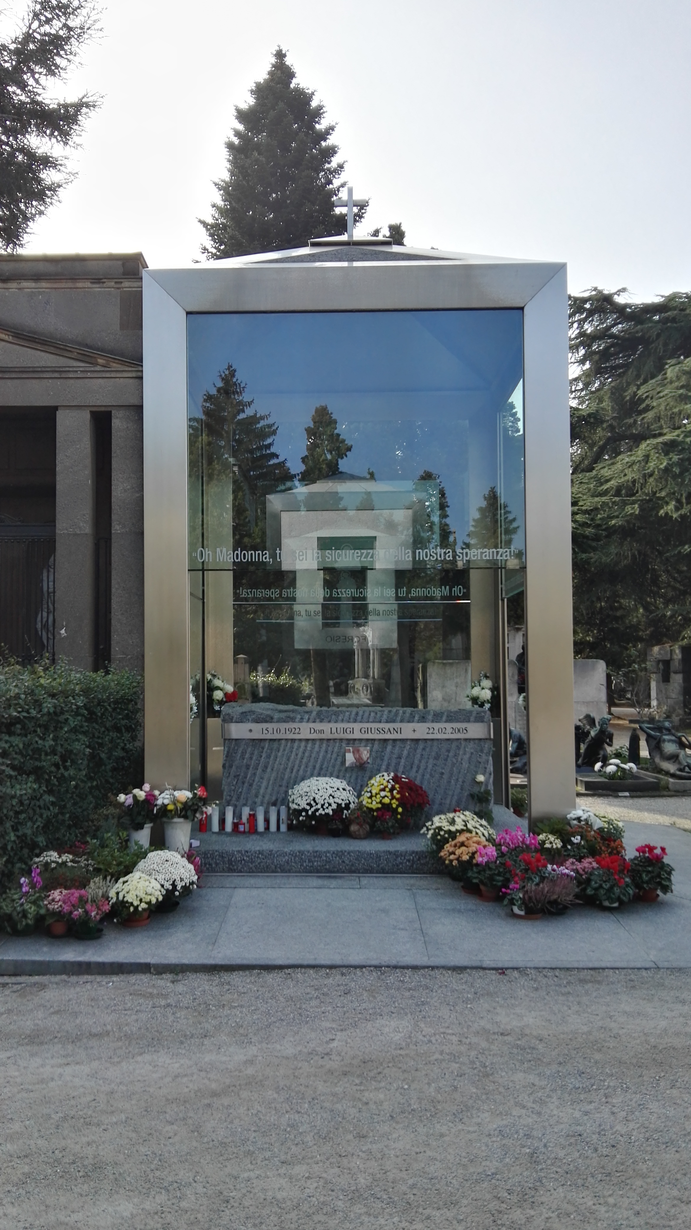 Cimitero Monumentale in Mailand